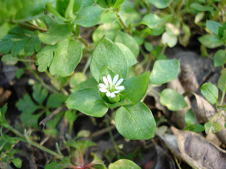 Stellaria media (Stellaire intermédiaire, morgeline, mouron des oiseaux) Photo prise à Ille-sur-Têt en mars 2005, Utilisateur:Jeantosti, GFDL